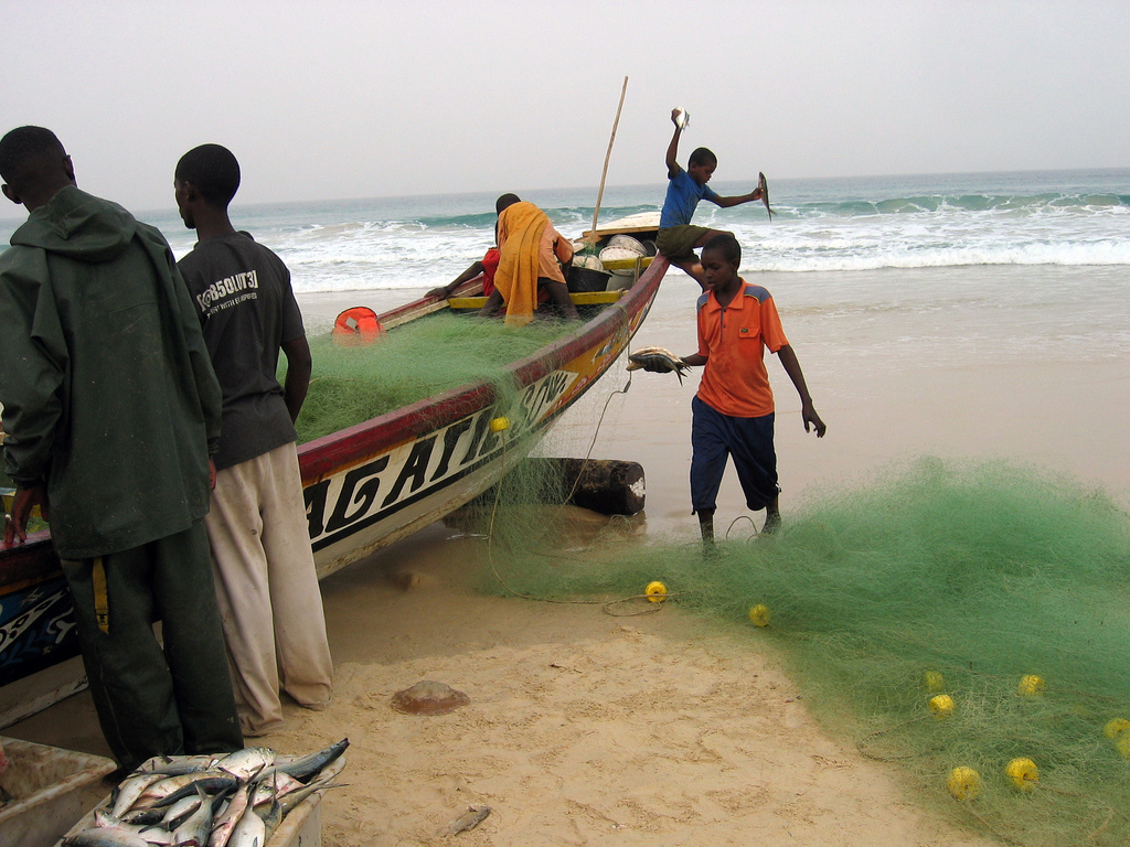 Pêcheurs à Lompoul sur Mer (Sénégal)